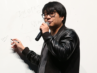 여기서 끝이 아니다! 서울예술실용전문학교 만화학과 특강 교수 하루3컷 배진수 작가님은 어떻게 빨리 웹툰 작가로 데뷔할 수 있는 길을 소개하며 학생들의 많은 호응을 얻었답니다.